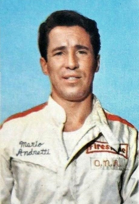 Mario Andretti en 1970 - Campioni dello Sport 1970-1971, n°56